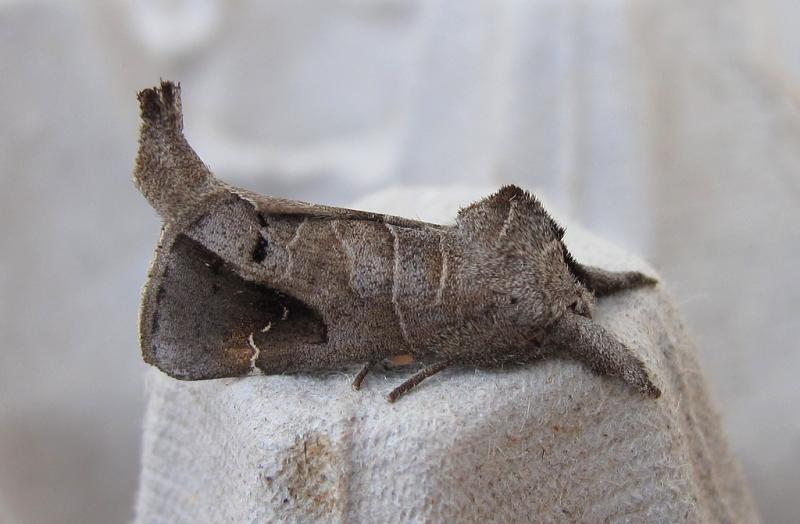 Kleine wapendrager (Clostera anachoreta)